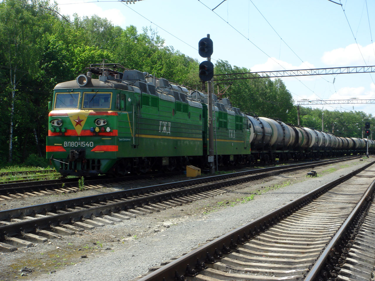 Zug in der Nähe der Siedlung Sadovskiy.